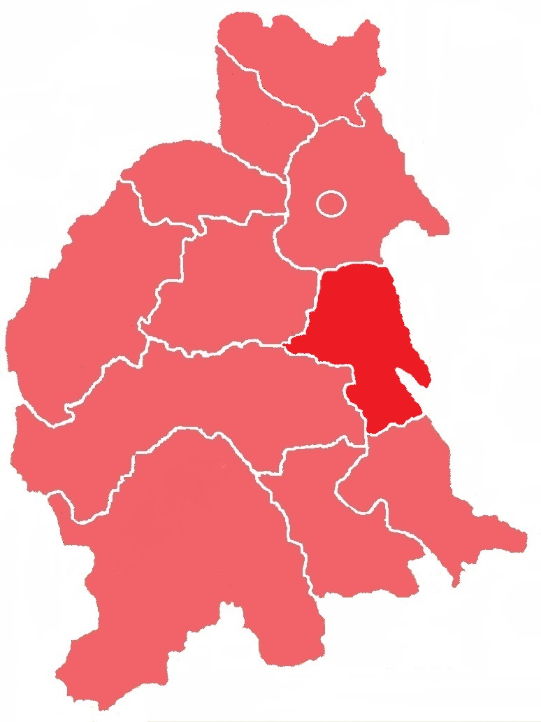 Серетський повіт